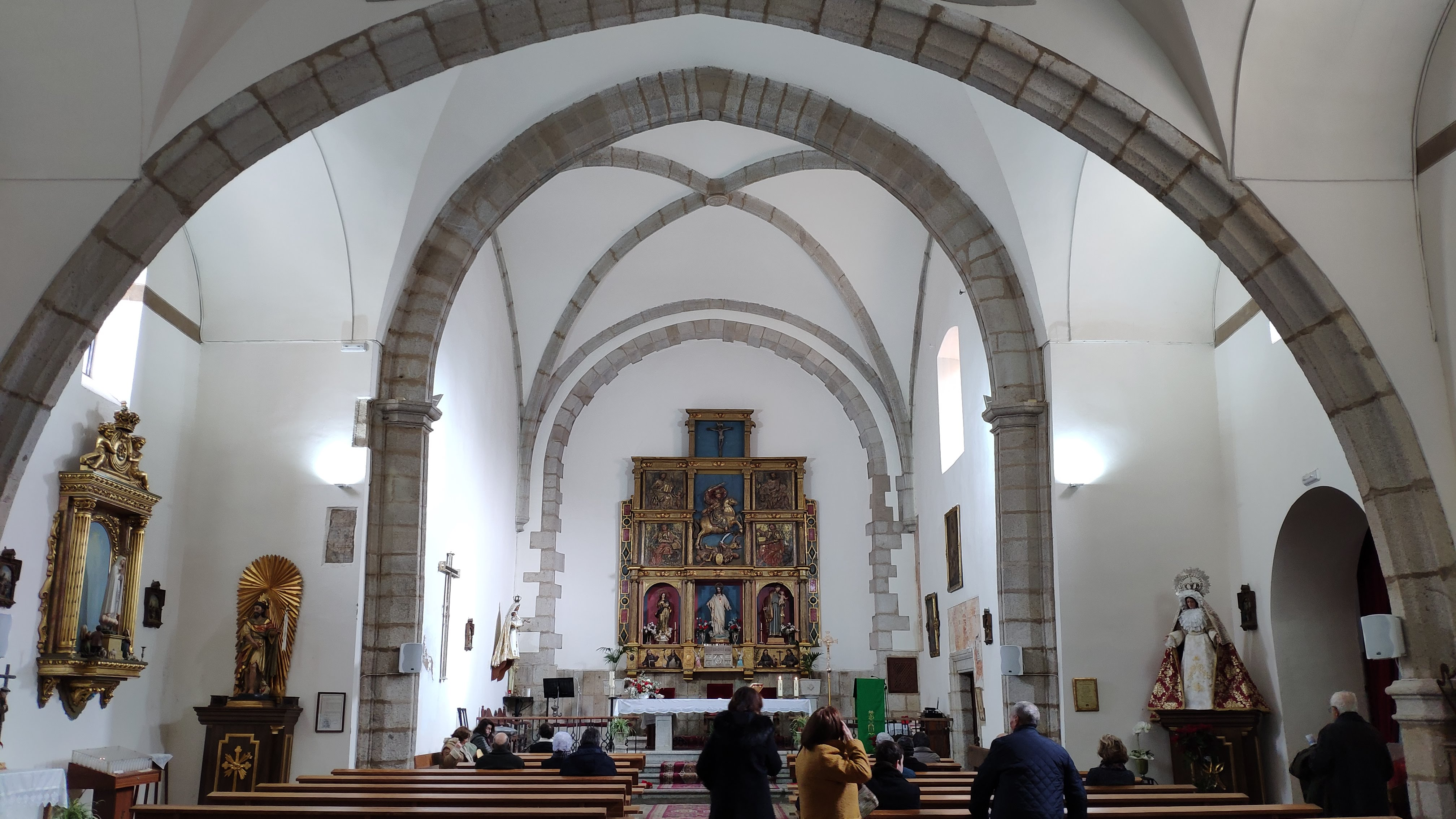 Interior de la iglesia de Santiago, Coria